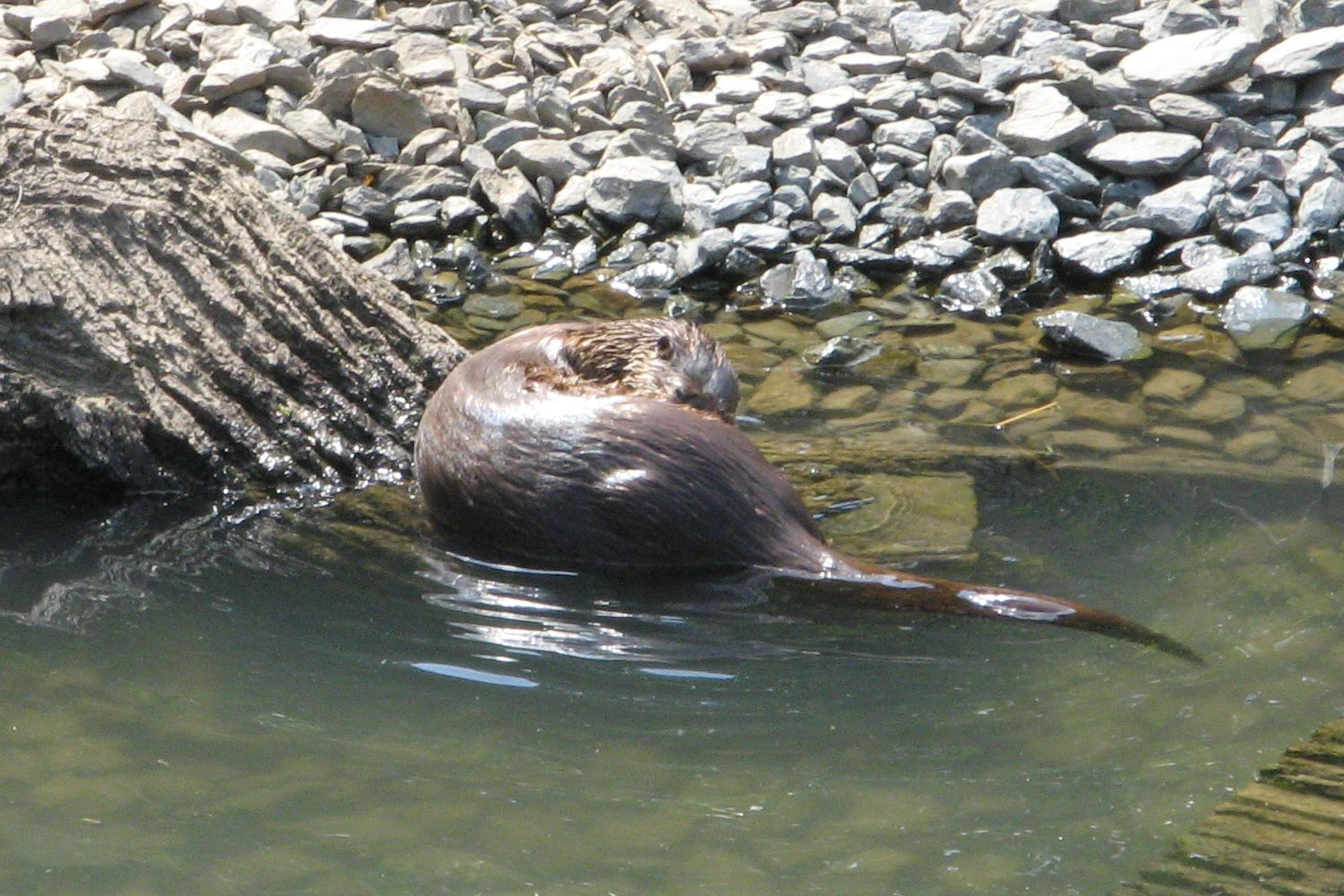 Fischotter (Lutra lutra) im Tiergarten Weilburg